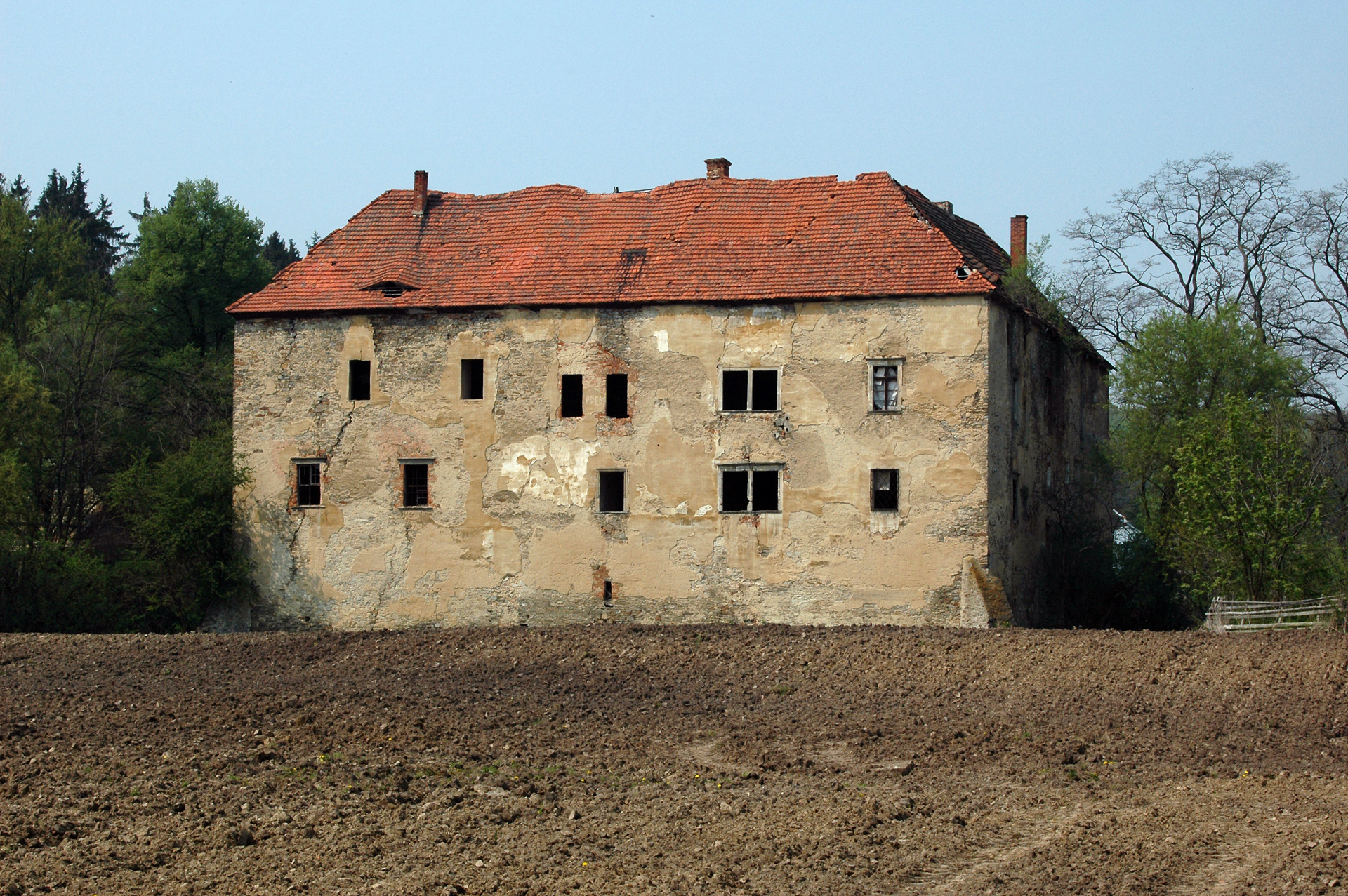 Zamek z fosą (ruina) Nieszkowice 47